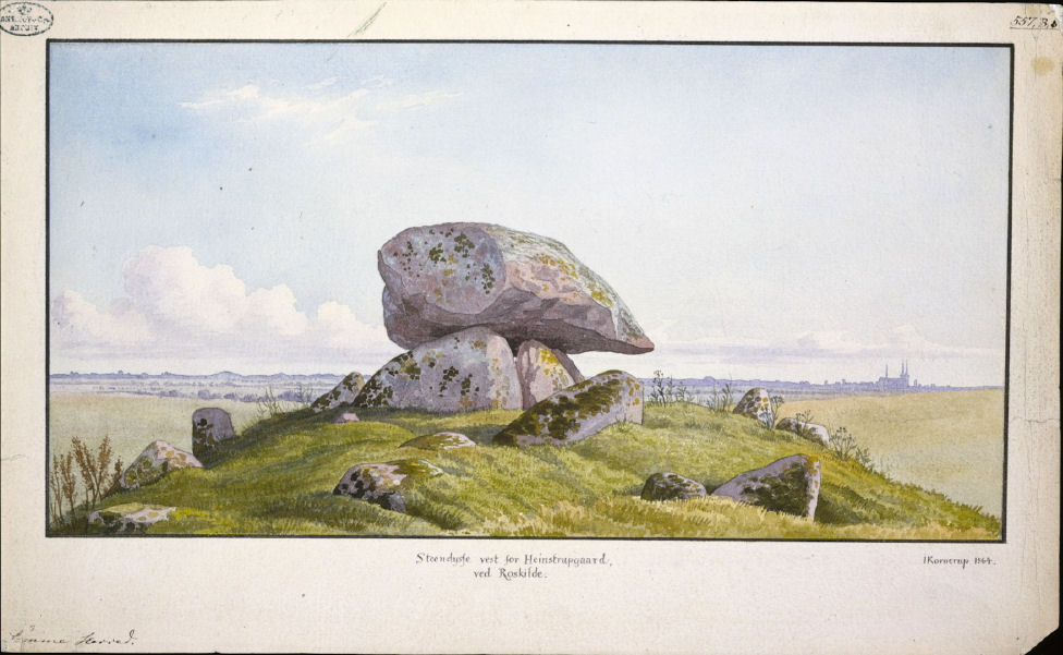 Akvarel af J. Kornerup, 1864. Runddysse vest for Heinstrupgård ved Roskilde, set mod øst. I baggrunden ses Roskilde Domkirke.